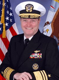 Walter B. Massenburg